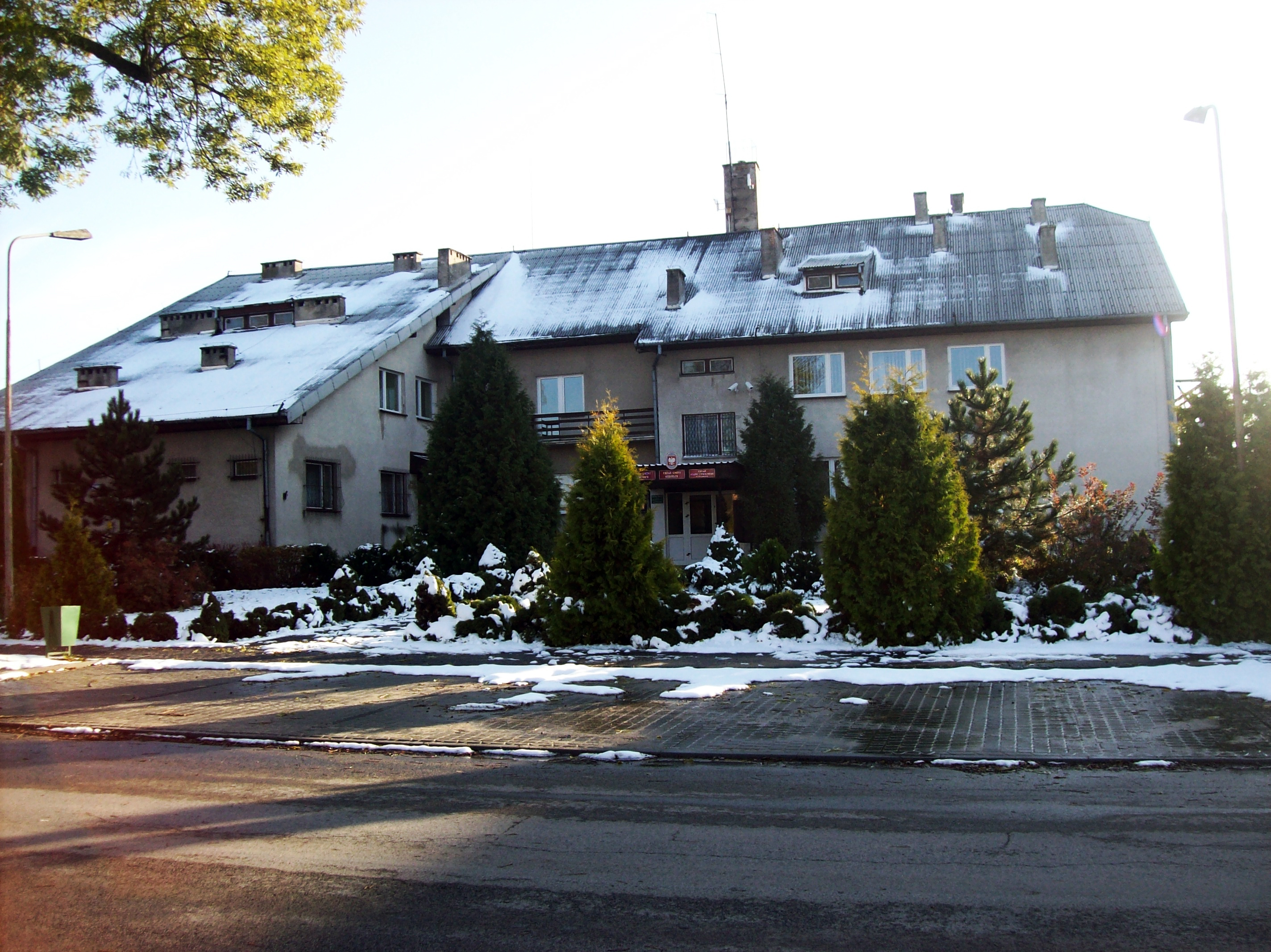 Urząd gminy w Strzelcach (powiat kutnowski)